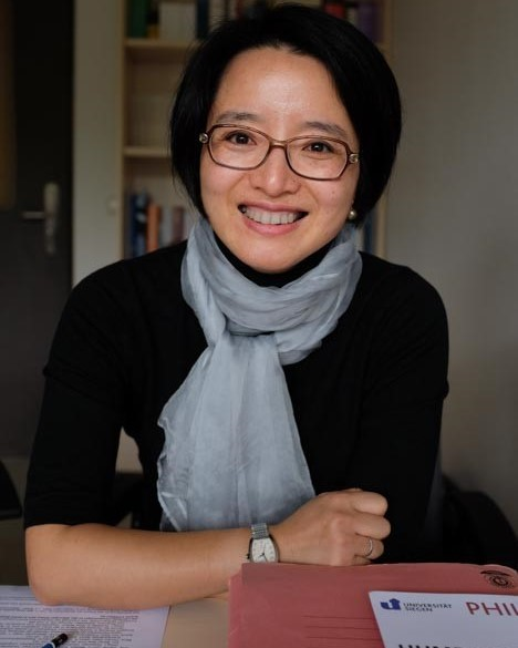 Prof. Dr. Zhao Jin